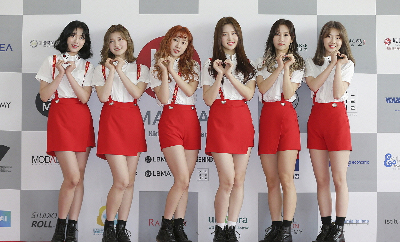 페이버릿(FAVORITE) 2018 LBMA STAR 공연